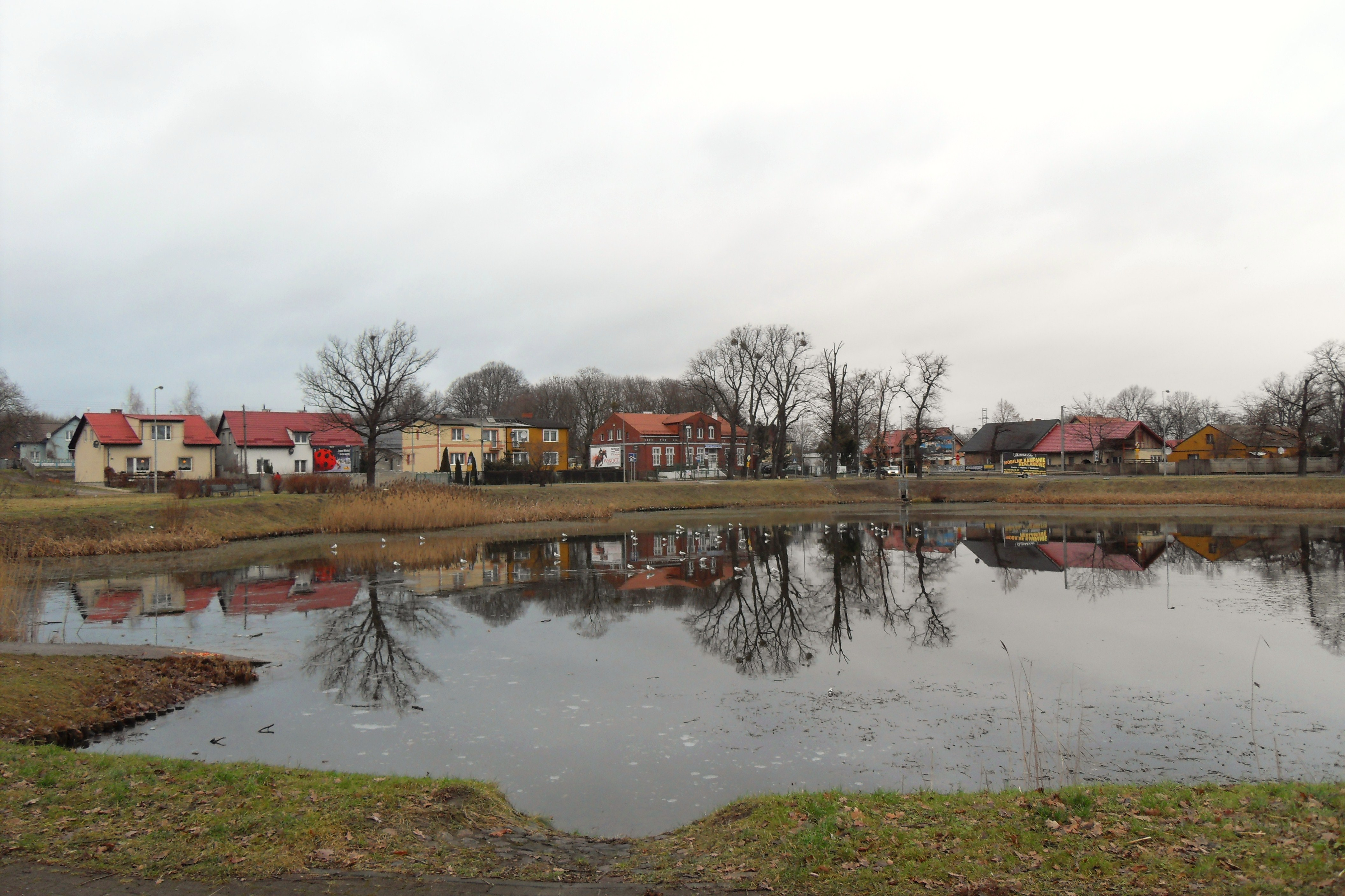 Gdańsk Stare Ujeścisko, dawny staw.